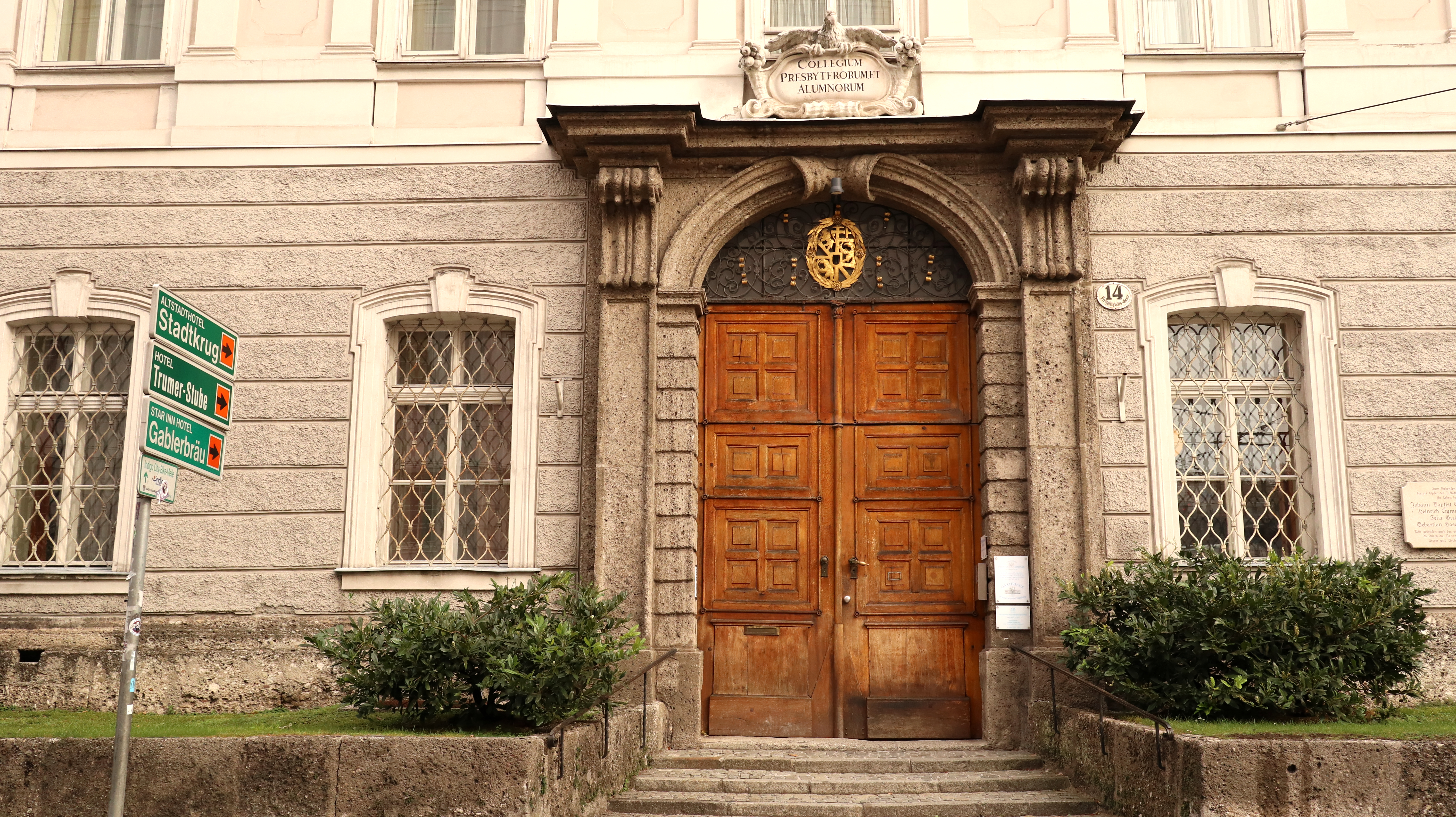 Priesterhaus in Salzburg, aussen und innen und Durchblicke zur Dreifaltigkeitskirche (Salzburg)